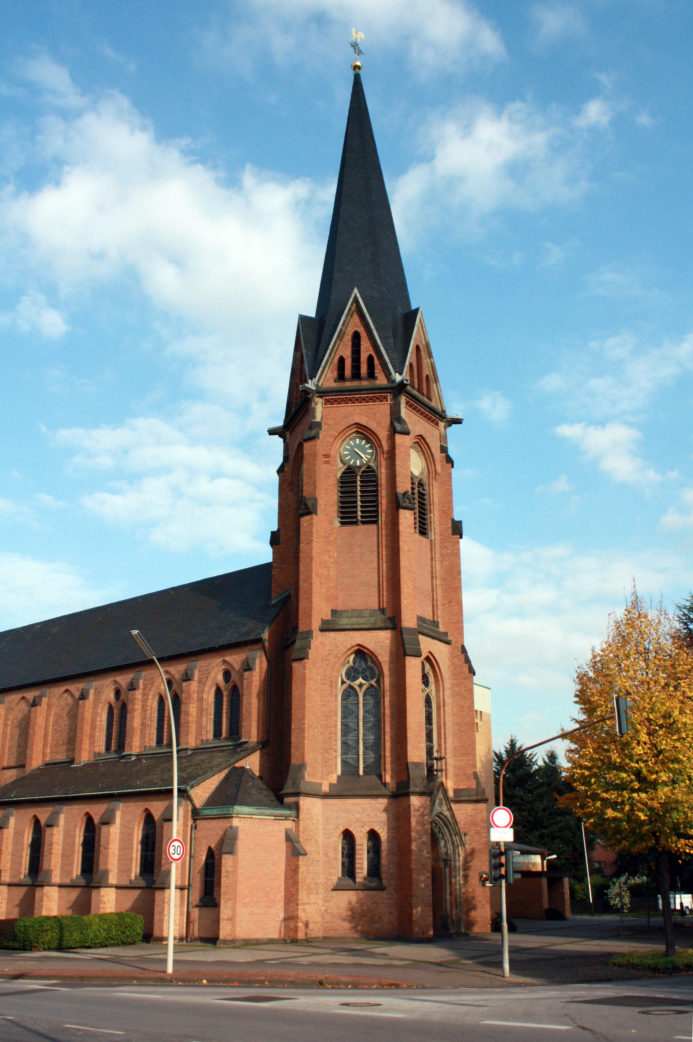 Hürth-Hermülheim. St. Severin